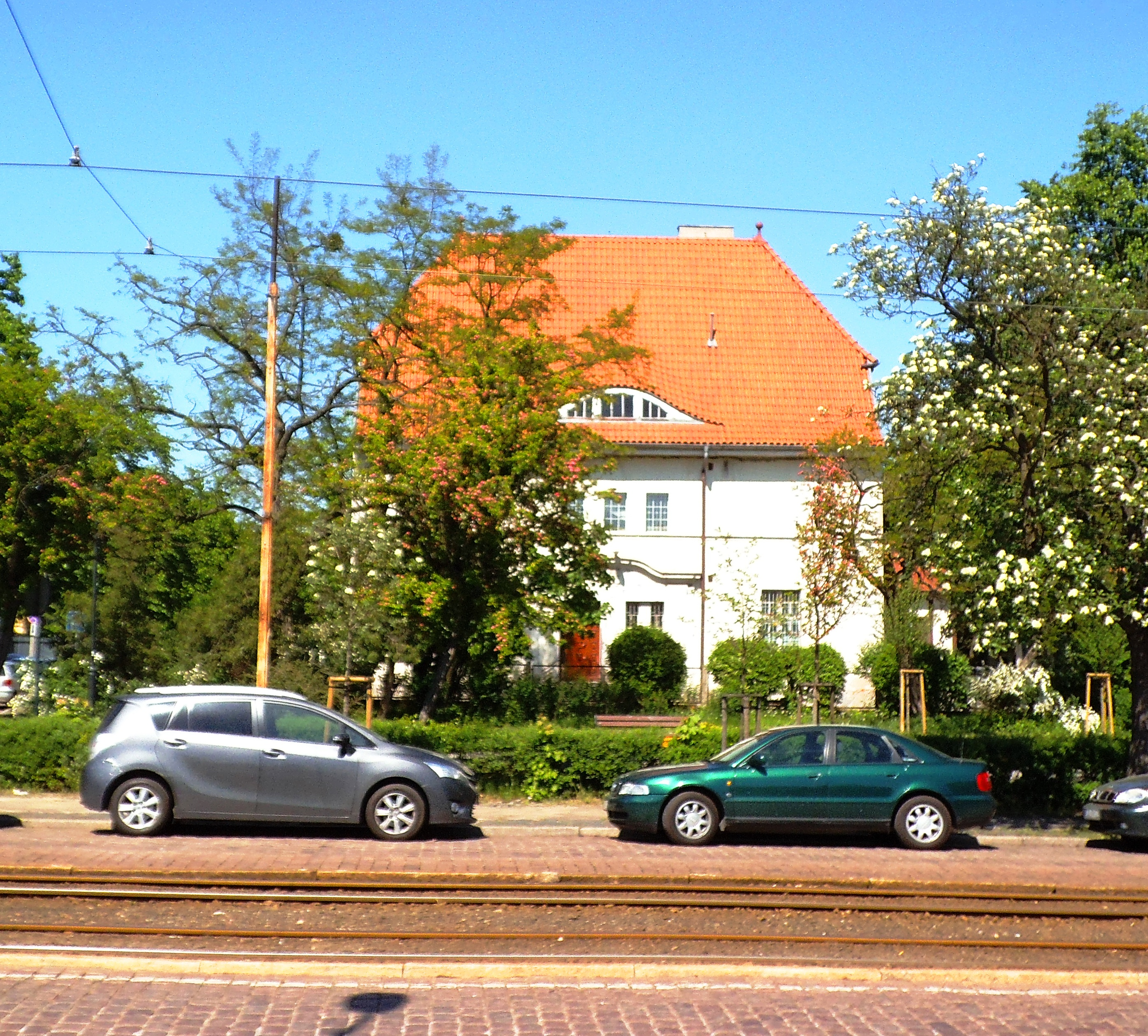 Budynek przy ulicy Fredry 2 w Toruniu